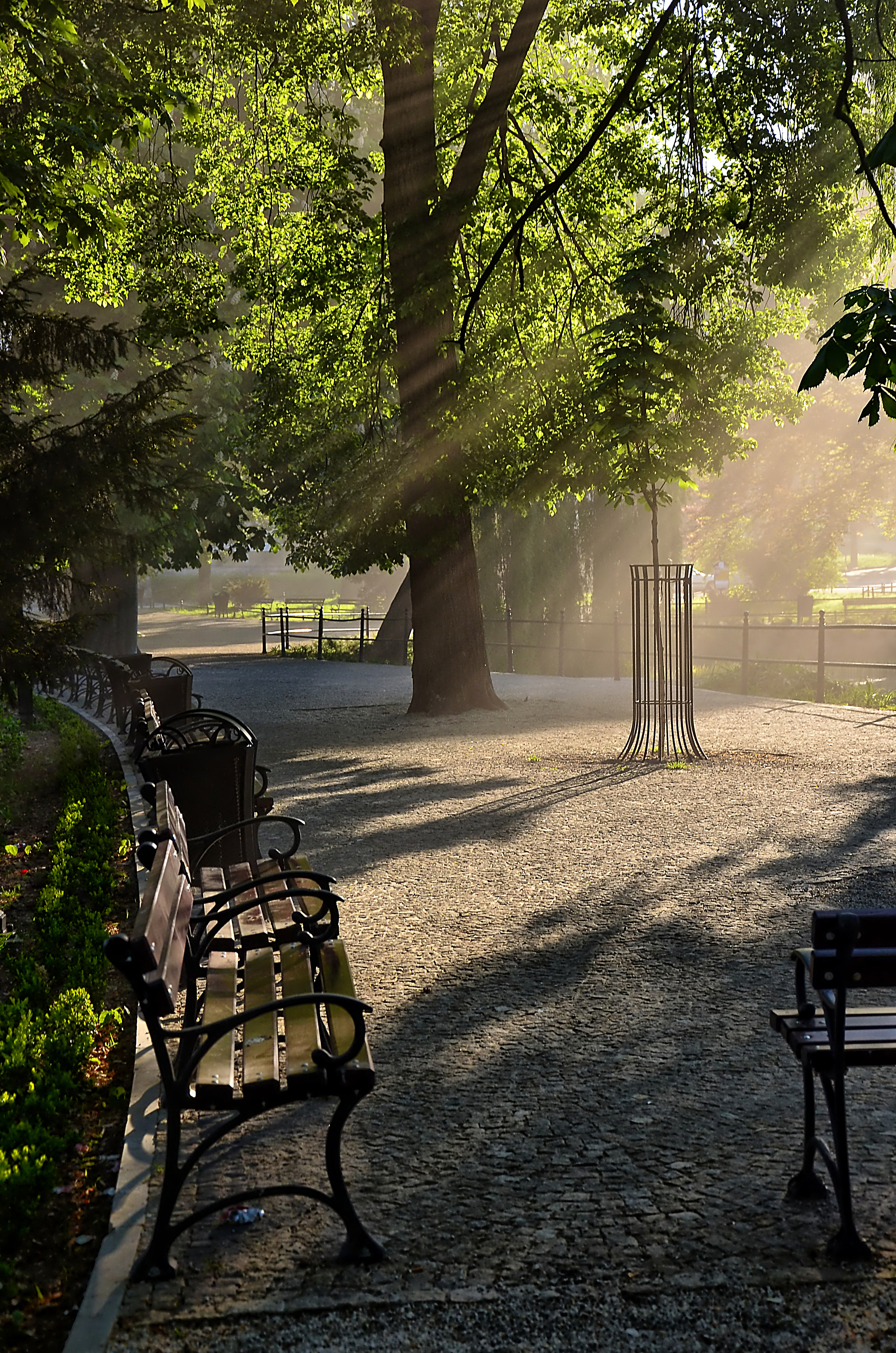 Planty miejskie powstałe po 1867 roku. Miasto Bolesławiec.